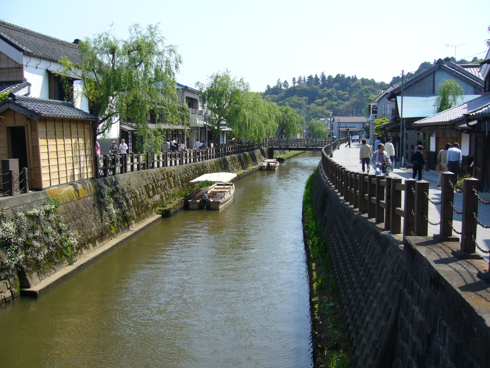 onogawa-river,sawara,katori-city,japan